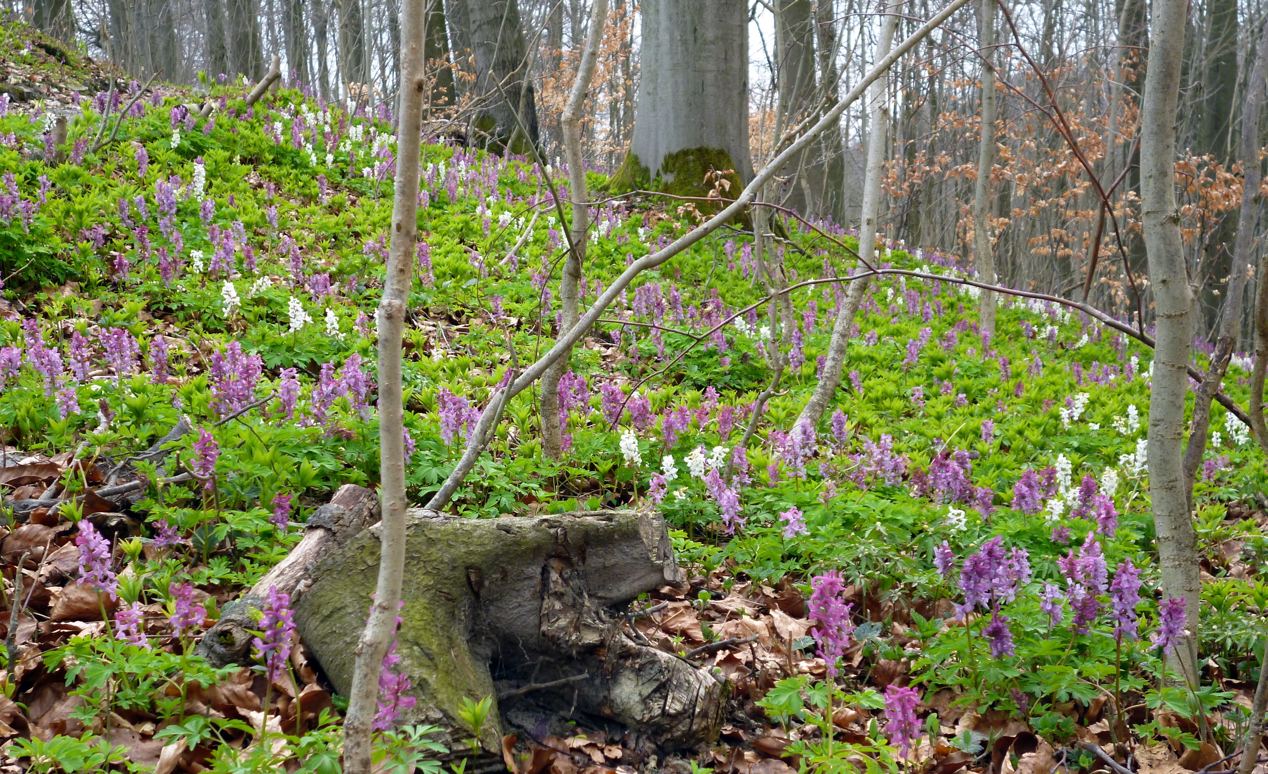 Mit Hohlem Lerchensporn (Corydalis cava) bewachsener Waldboden